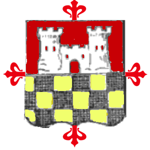 armas de VILLALONGA sobre cruz de Calatrava